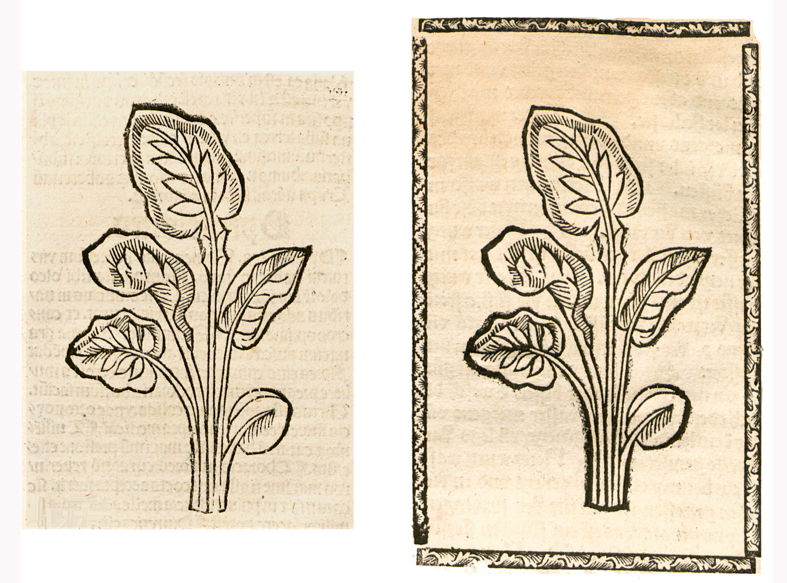 Abbildung von: Noter Wurtz (Polygonum bistorta)